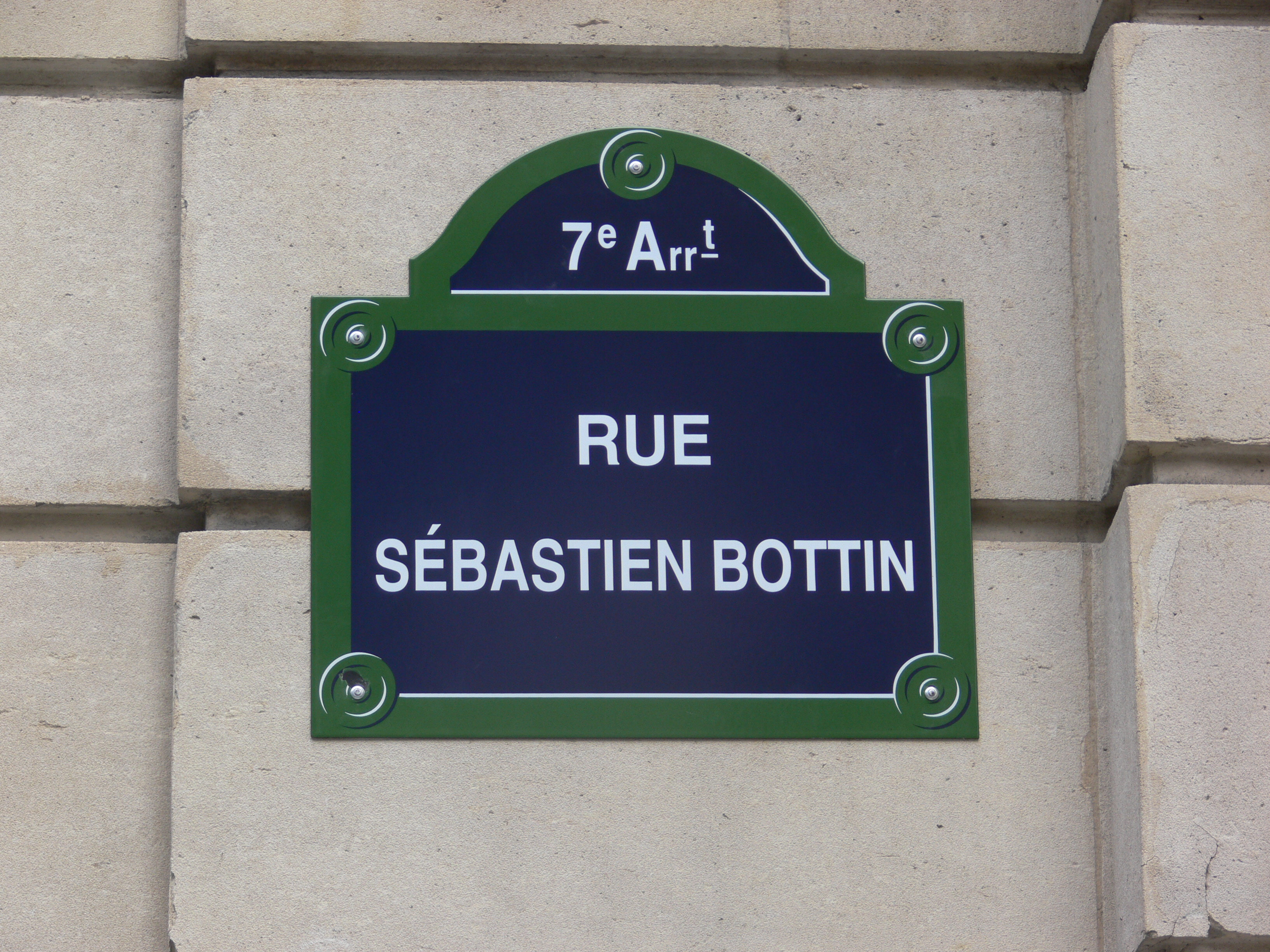 Nouvelle plaque de la rue Sébastien-Bottin après création de la rue Gaston-Gallimard (15 juin 2011)